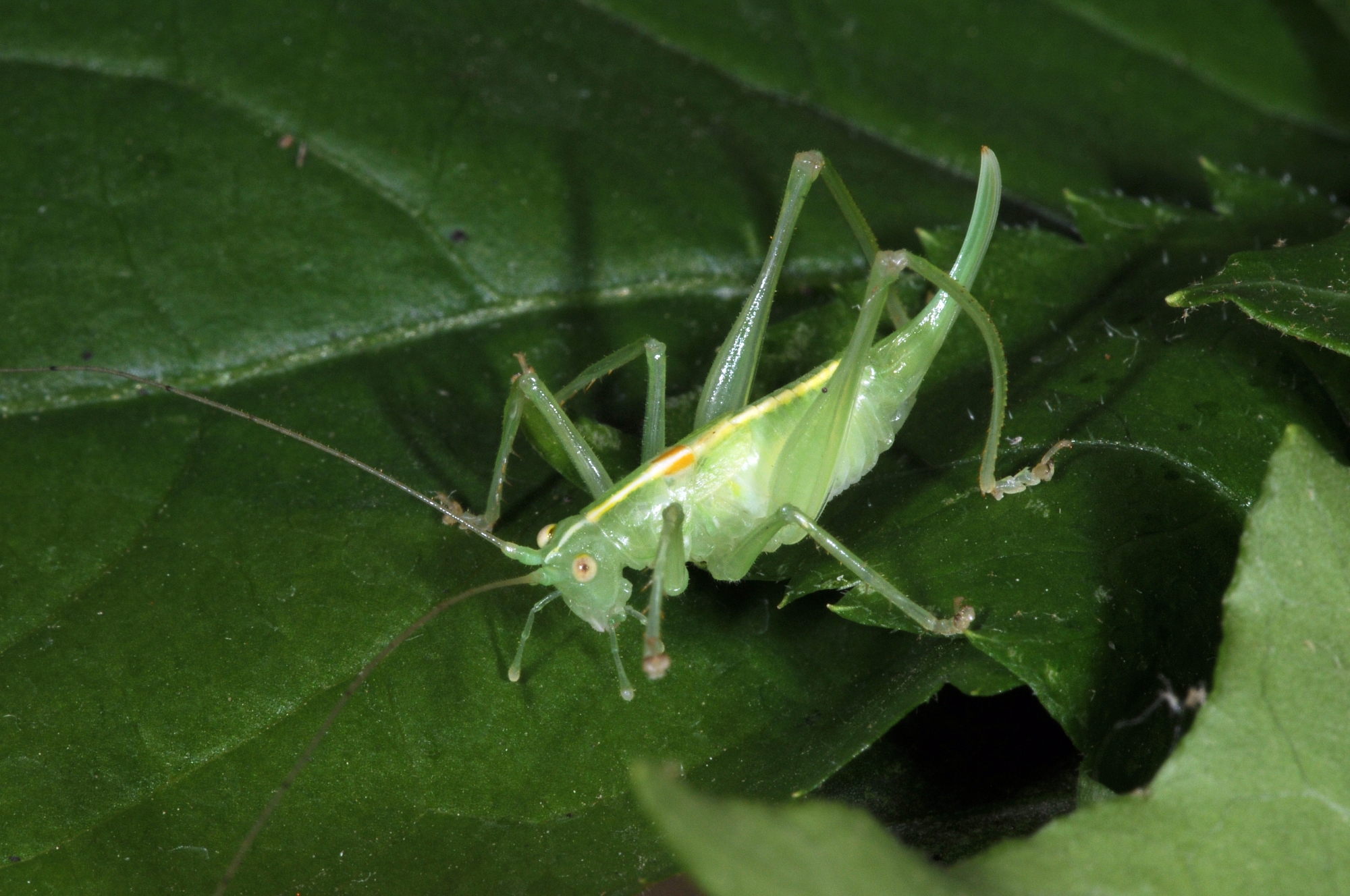 Meconema meridionale, Weibchen, Mainzer Sand, Rheinland-Pfalz, Deutschland